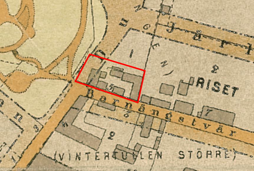 Del av karta över Stockholm visande Faggens krog